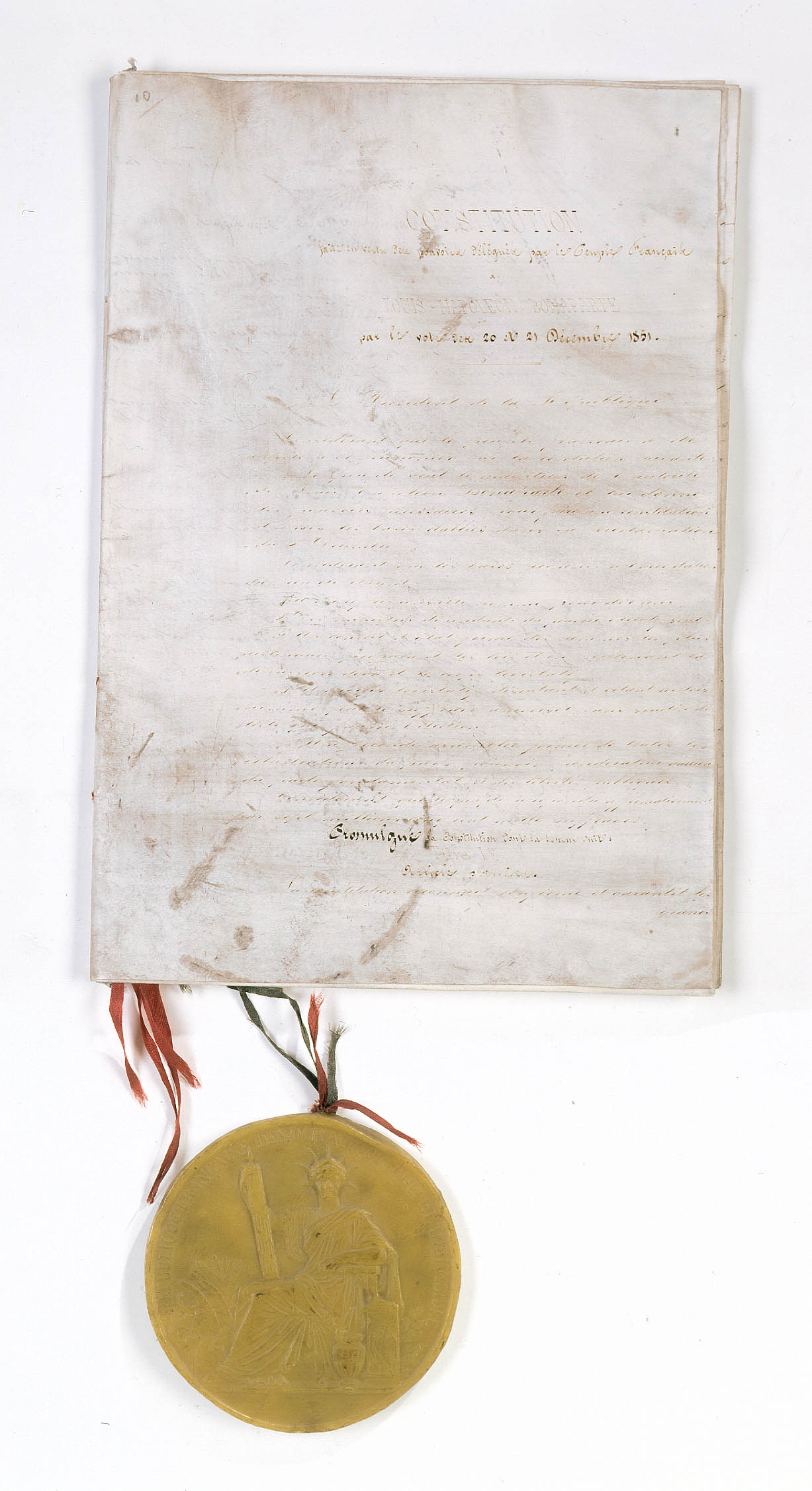 Constitution du 14 janvier 1852. Le sceau est celui de la République française, car la dignité impériale sera rétablie seulement par le sénatus-consulte du 7 novembre 1852.